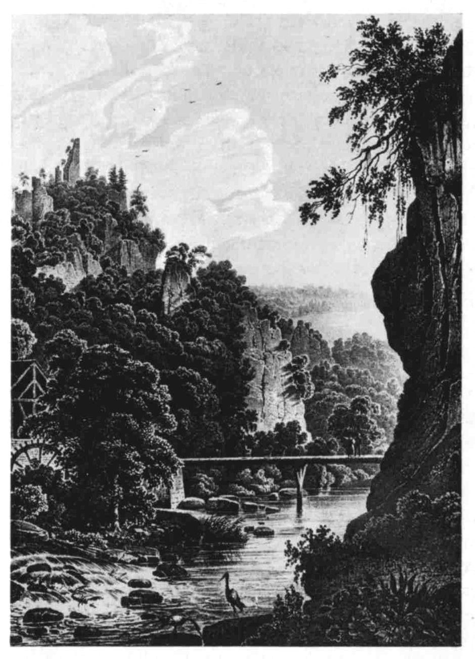 Gutenburg, Lithographie von Engelmann nach einer Zeichnung von T. M. Ring